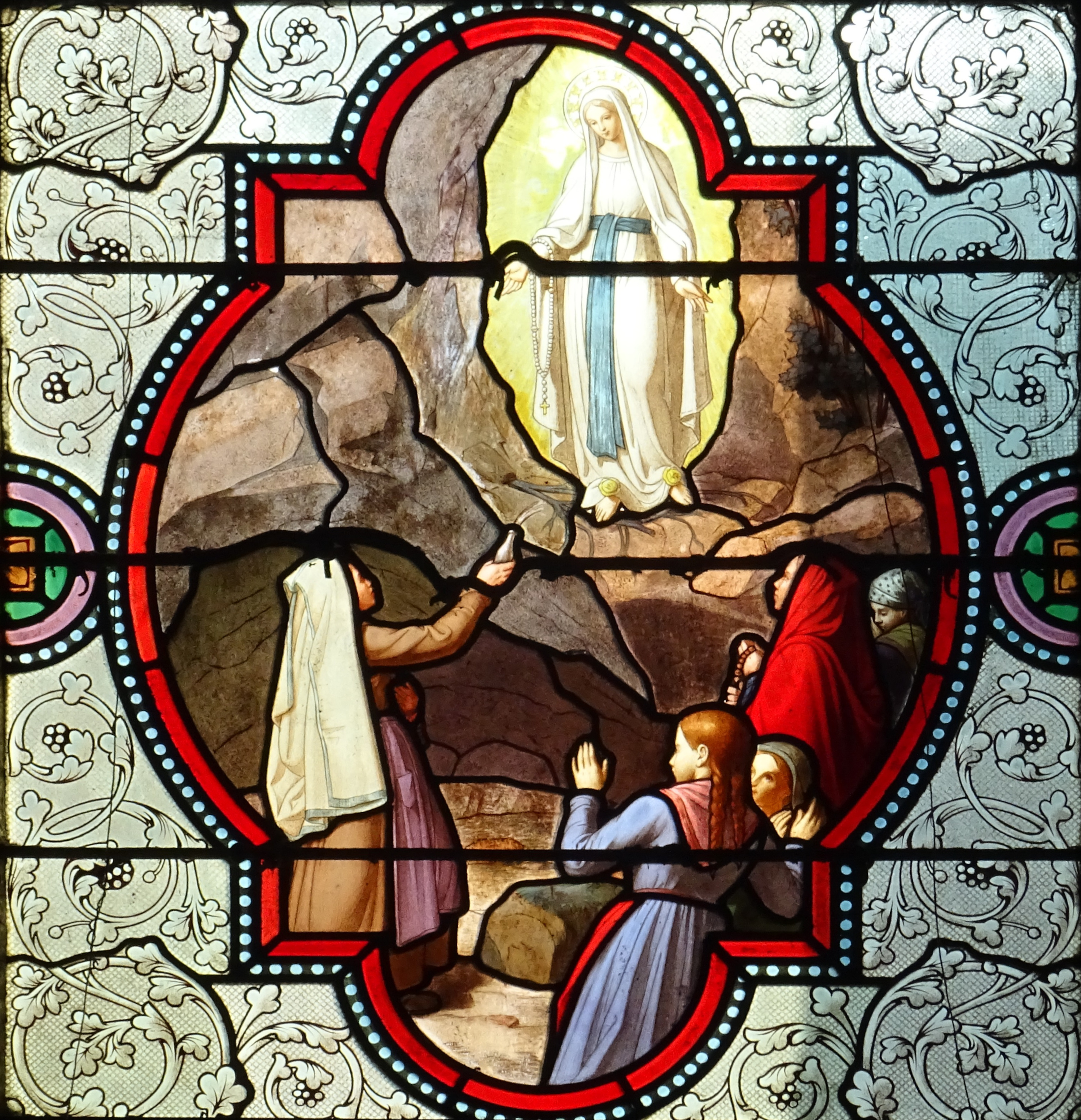 Lourdes - Vitrail de la basilique de l'Immaculée Conception - 2ème apparition de la Vierge à Bernadette